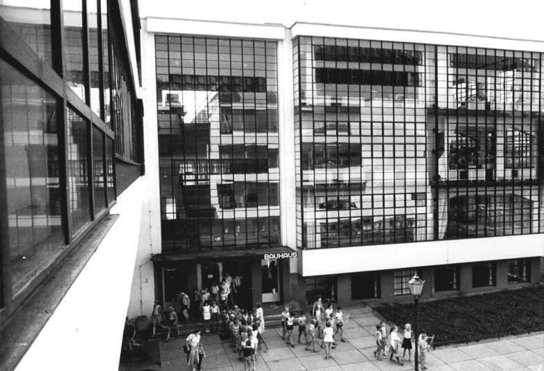 Dessau, Bauhaus ADN-ZB Lehmann 4.8.1983 Bez. Halle: Im Dessauer Bauhaus wurde am 4.8.1983 eine Ausstellung eröffnet, in der Ergebnisse des soeben beendeten Sommerseminars des Hauses gezeigt werden. Es handelt sich um Entwürfe zur Fertigung von Kleinmöbeln und Gebrauchsgegenständen aus Restholz. Das Bauhaus wurde 1925-26 nach einem Entwurf von Walter Gropius errichtet. Nach Beschädigungen im Krieg wurde das Gebäude 1975-77 rekonstruiert. (siehe auch 1983-0804-026 und ADN-Meldung)